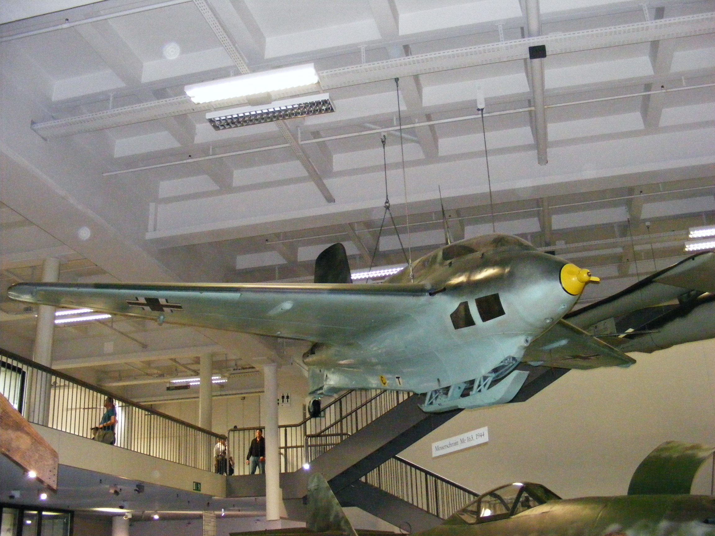 Messerschmitt Me 163, 1944 (München, Deutsches Museum)